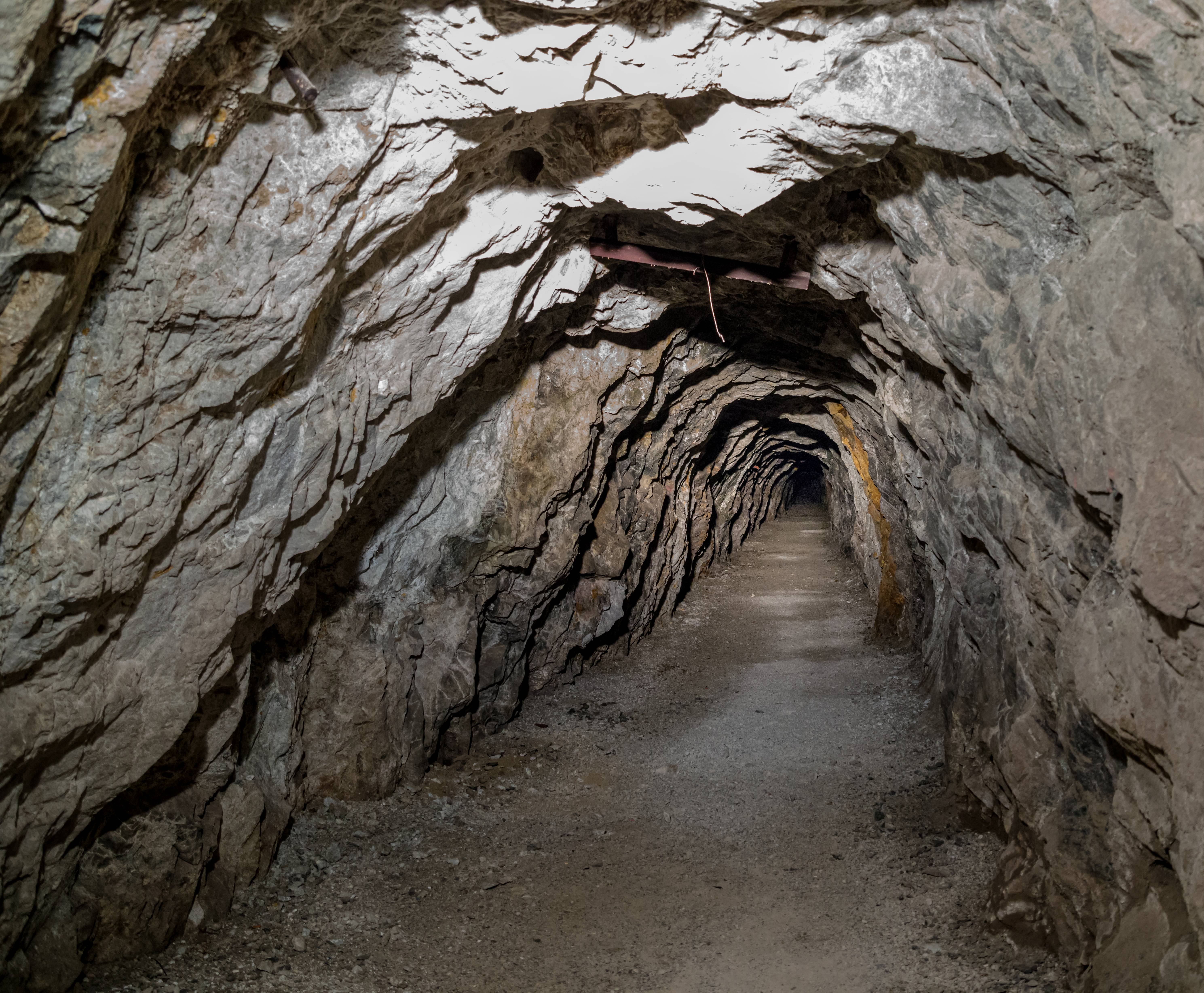 Der Barbarastollen ist der Zentrale Bergungsort der Bundesrepublik Deutschland zur Lagerung von fotografisch archivierten Dokumenten mit hoher national- oder kulturhistorischer Bedeutung. Er ist in Europa das größte Archiv zur Langzeitarchivierung. Die Bilder sind im Rahmen einer Führung des Bundesamts für Bevölkerungsschutz und Katastrophenhilfe (BBK) entstanden - Wikipedia Stammtisch,das 113. Treffen am 30. Mai 2016 Der Stollen in dem Bereich nach den Lagerstollen, Tiefe ca 300m nicht ausgebaut